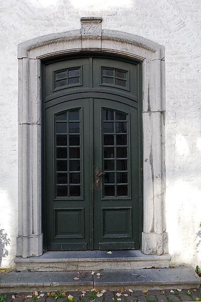 Erkelenz Altes Rathaus